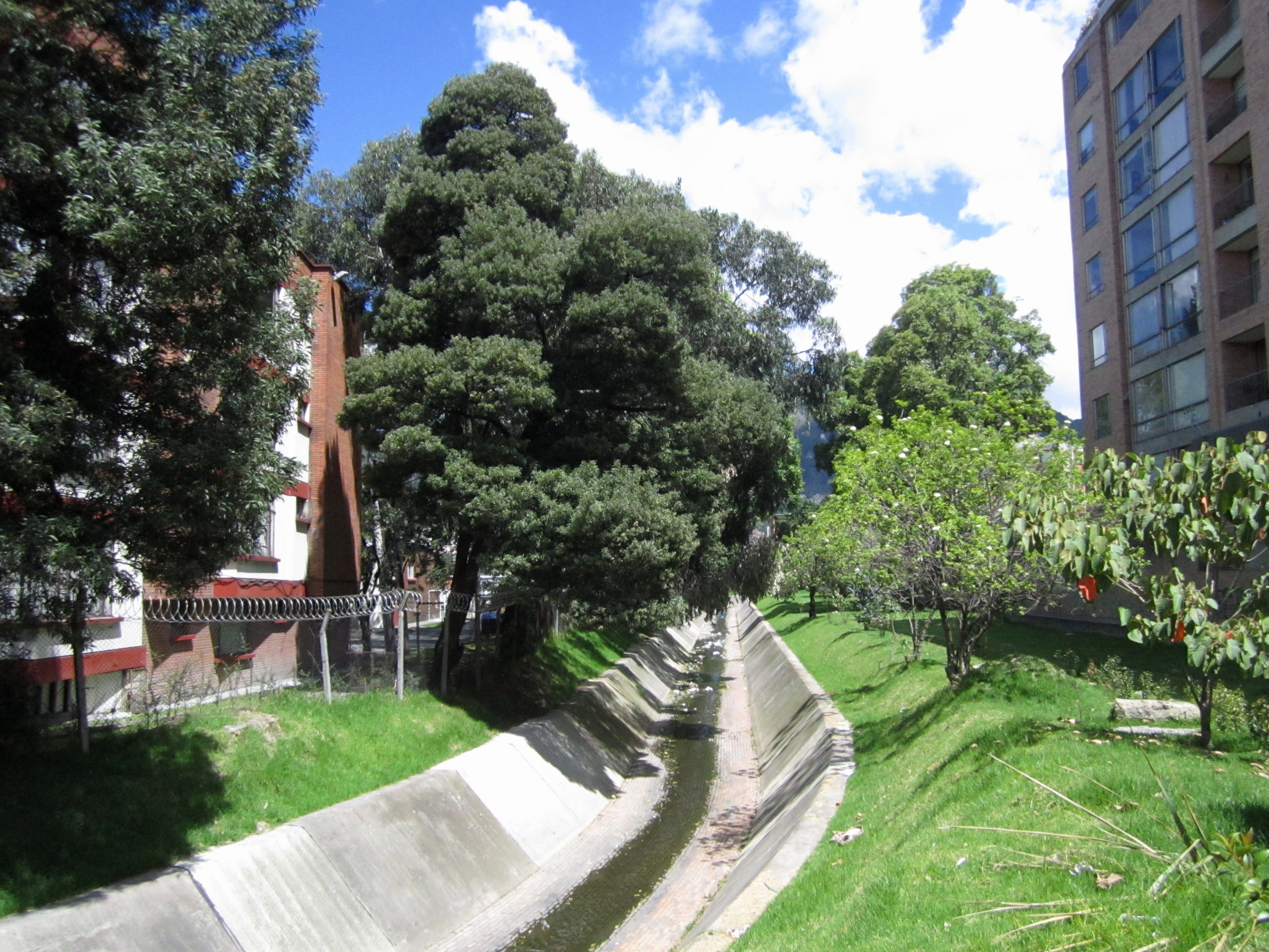 Barrio canal Arzobispo vegetación hacia la carrera 30 o avenida NQS.